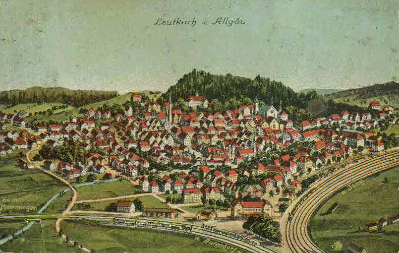 Ansichtskarte von Eugen Felle; Technoseum (Landesmuseum für Technik und Arbeit Mannheim) Motiv: Leutkirch im Allgäu